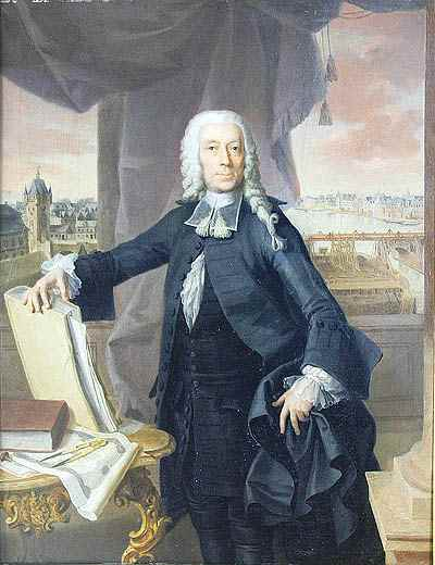 Portrait of Francfort Mayor Johann Friedrich Armand von Uffenbach (1687 – 1769) in front of the Old Bridge in Francfort under reconstruction ca. 1742.